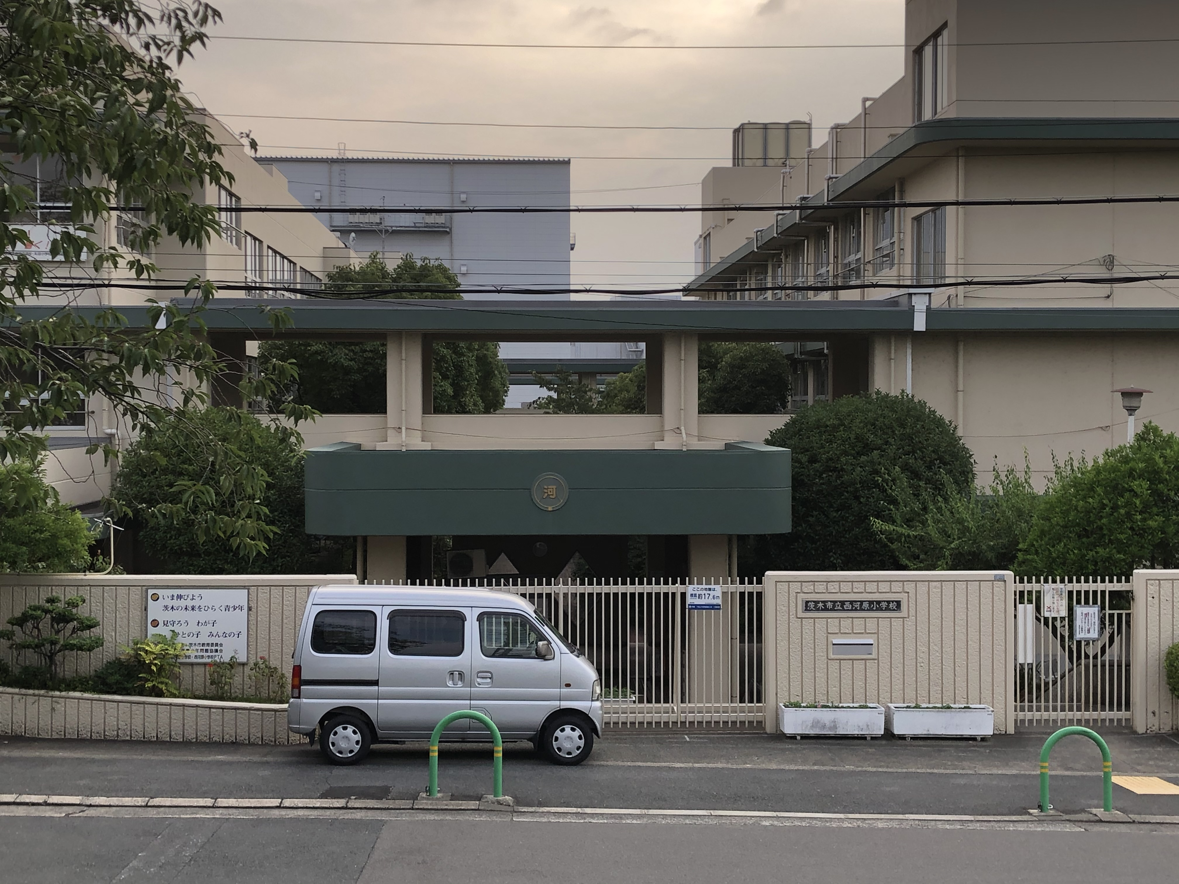 西河原小学校を正面から撮った写真である